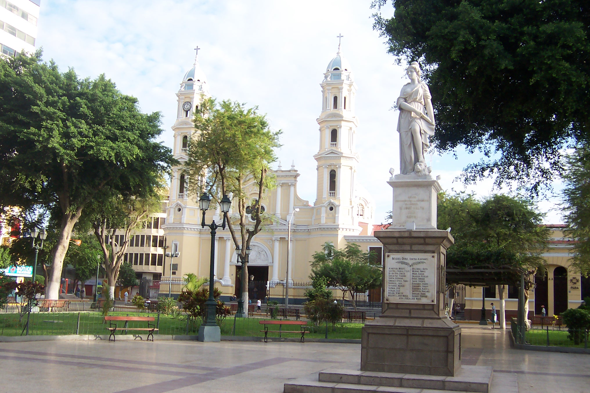 Plaza de Armas de Piura Plaza de Armas de Piura Autor: Alfredobi Fecha: marzo 2006